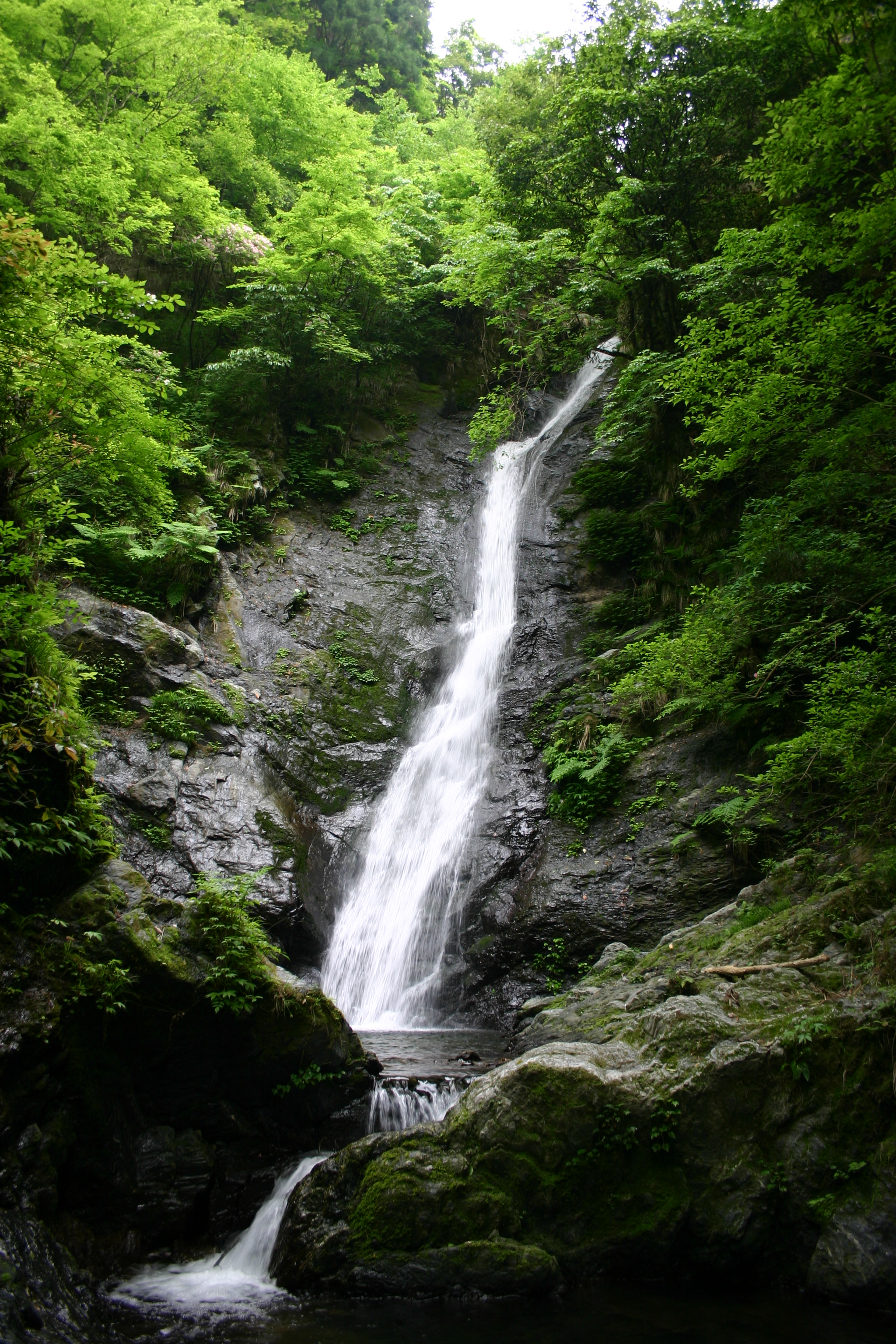 福井県おおい町名田庄にある野鹿の滝